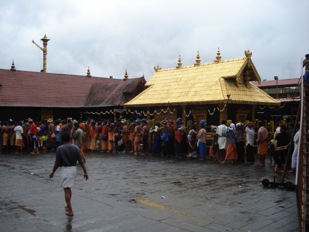 Sabarimala